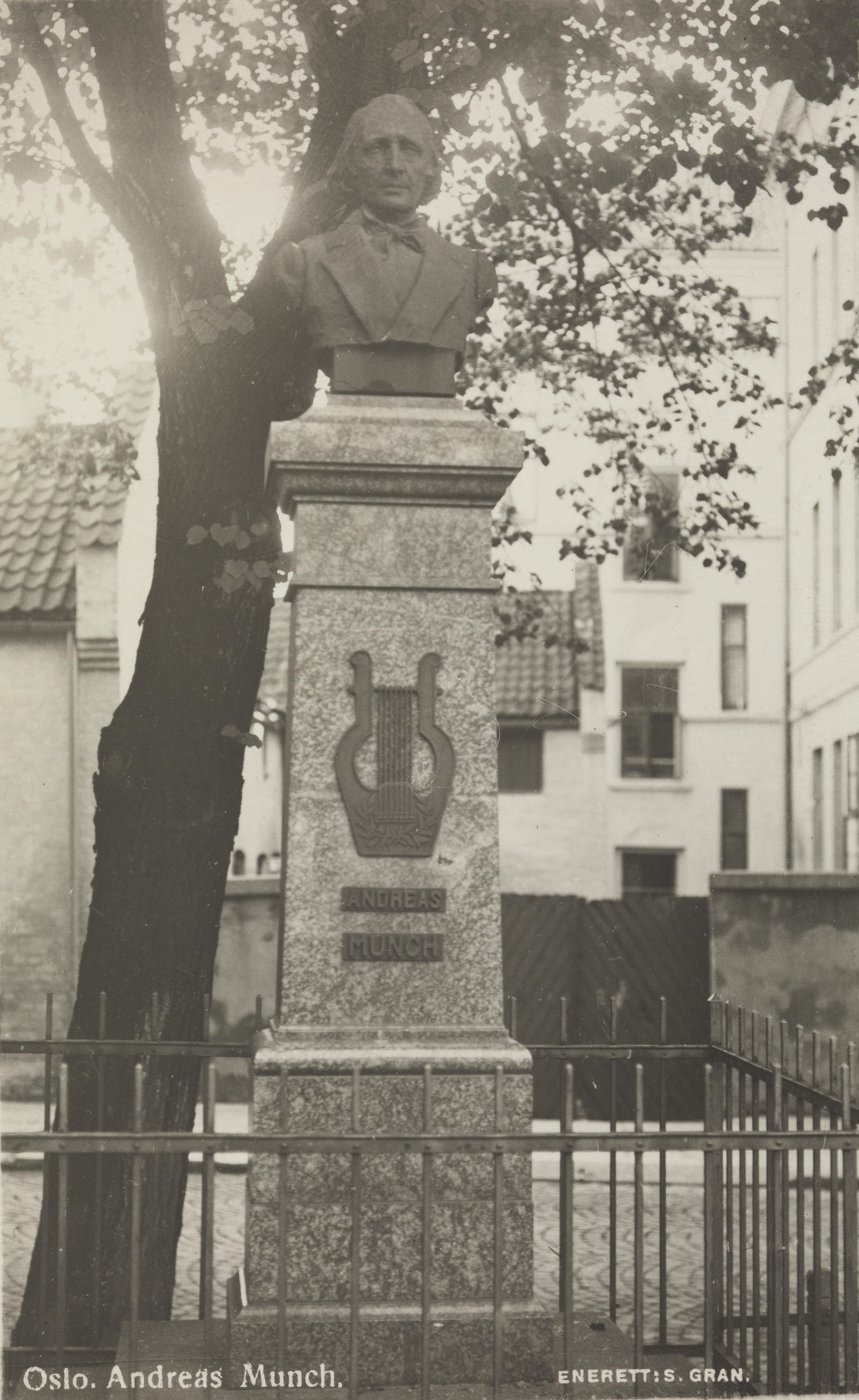 Bildet er hentet fra Nasjonalbibliotekets bildesamling Halfdan Kjerulfs plass, Oslo, Oslo